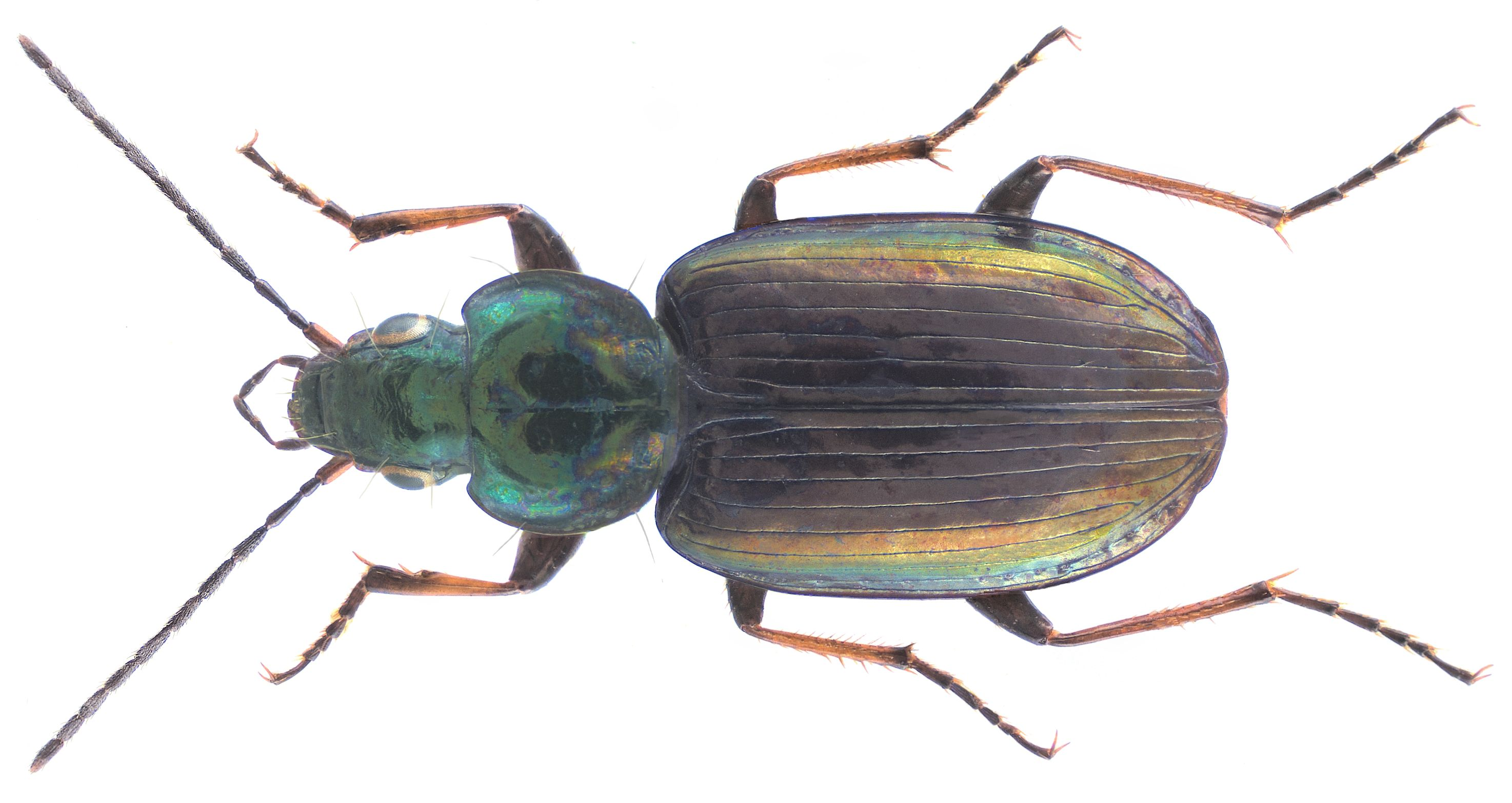 Familie: Carabidae Größe: 7-9 mm Verbreitung: Westpalaearktische Art Ökologie: mesophile Art des offenen Landes Fundort: Austria, Kärnten, Kleinkirchheim leg. det. U.Schmidt, 1981 Foto: U.Schmidt, 2008